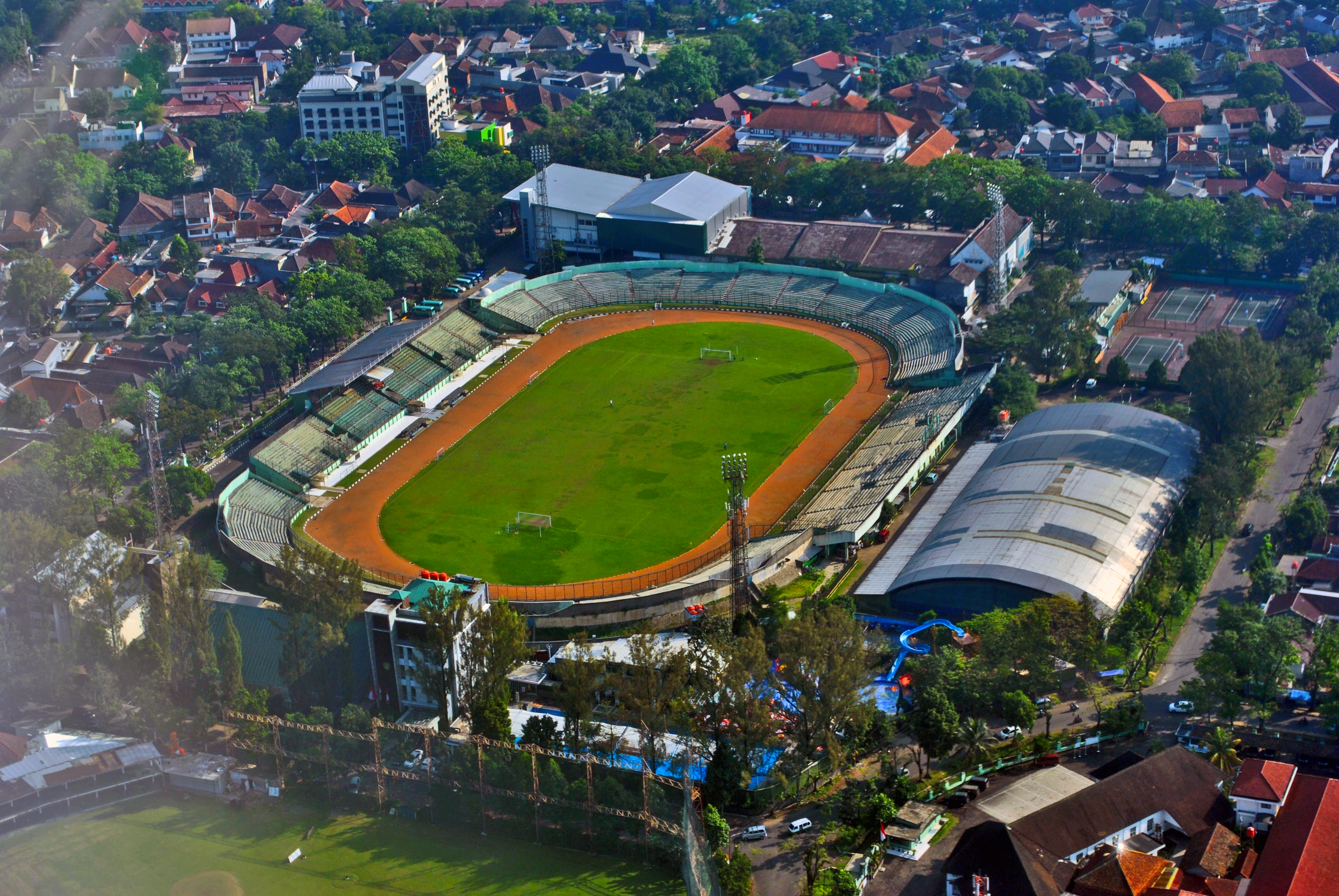 Former Persib Bandung's football stadium, now occupied by PS TNI (the armed forces' football club) Bekas kandang Persib Bandung sebelum pindah ke Si Jalak Harupat, sekarang kandang PS TNI. Panoramio mirror